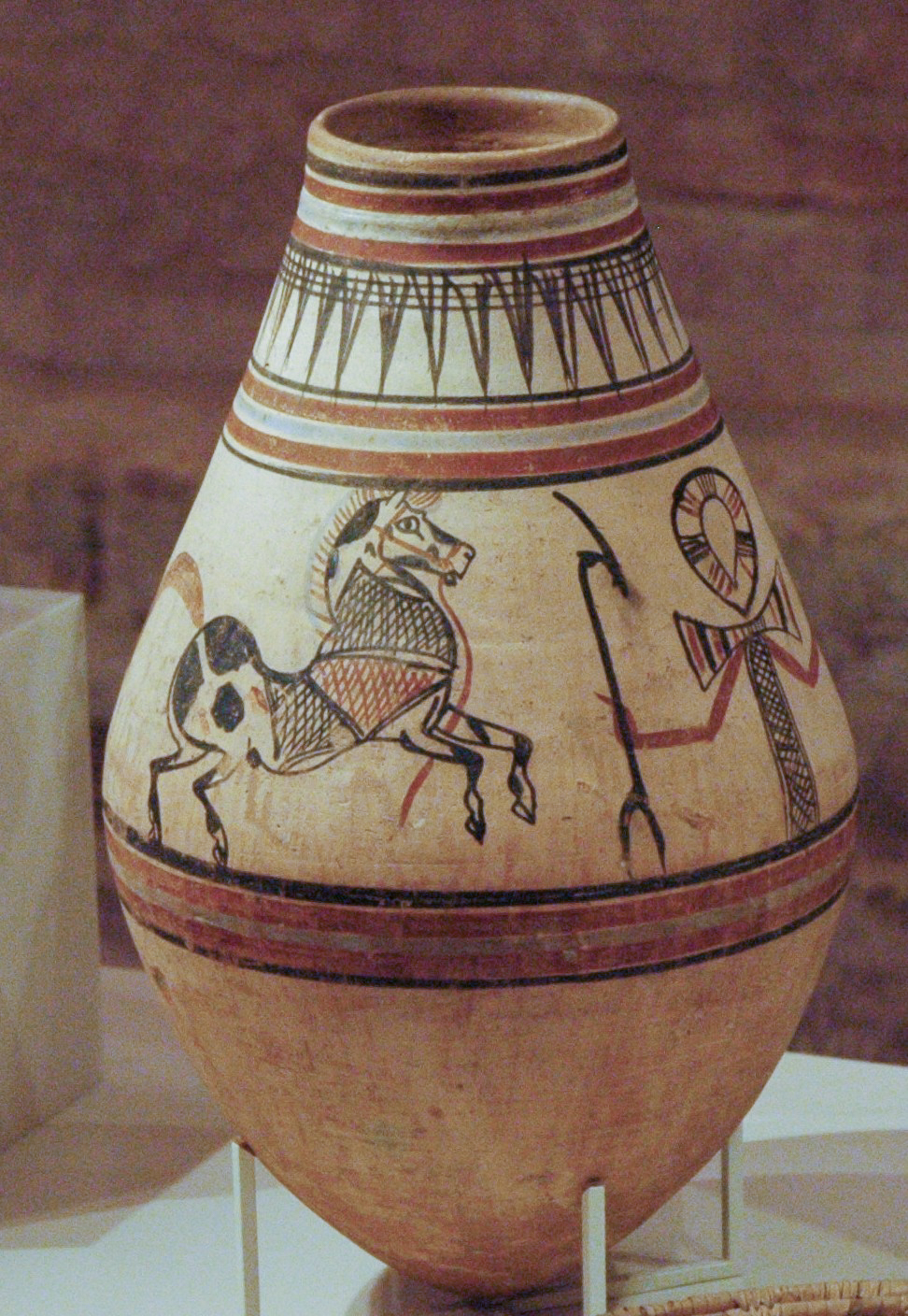 Grosses Gefäss mit der Darstellung eines gallopierenden Pferdes, Altes Ägypten, Neues Reich, 18. Dynastie, um 1340 v. Chr., Keramik, bemalt, ÄM 14412